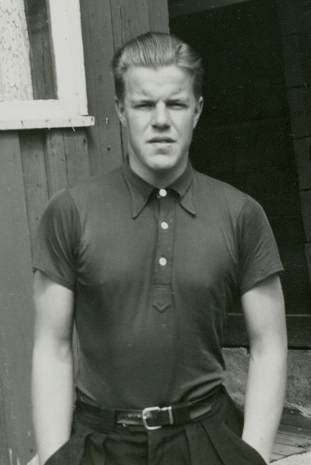 Asbjørn Ruud outside a cabin